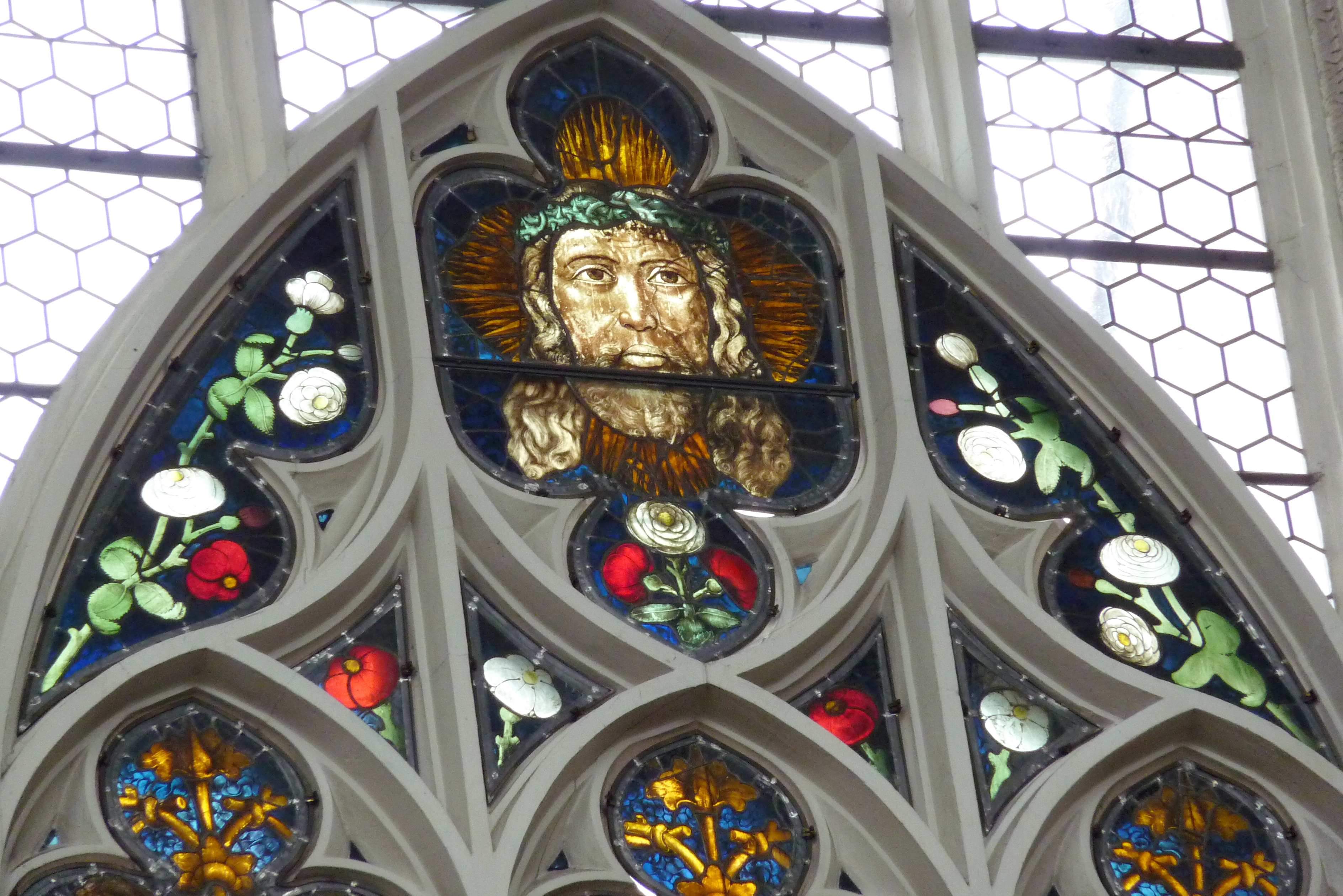 Bleiglasfenster in der Stadtpfarrkirche Mariä Himmelfahrt in Landsberg am Lech (Bayern, Deutschland)